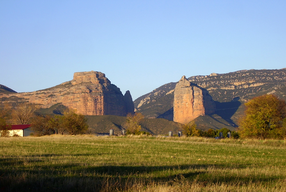 Fotografía de los "Mallos del Salto del Roldán", en las estribaciones meridionales de los Pirineos (Sierra de Guara)